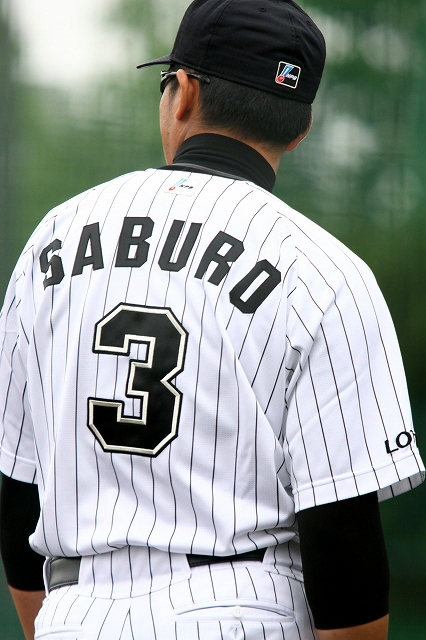 日本プロ野球 千葉ロッテマリーンズ サブロー外野手 背番号3